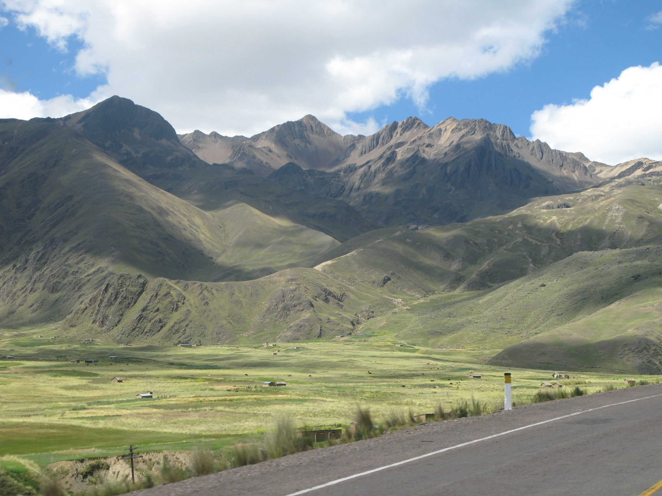 Tipična pokrajina na Altiplanu na poti proti Punu